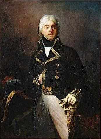 Commandé par Louis-Philippe pour le musée historique de Versailles en 1834